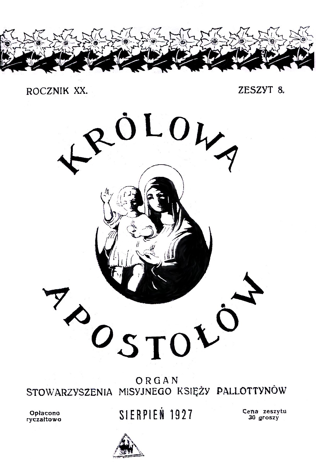 Okładka czasopisma "Królowa Apostółów" z 1927.